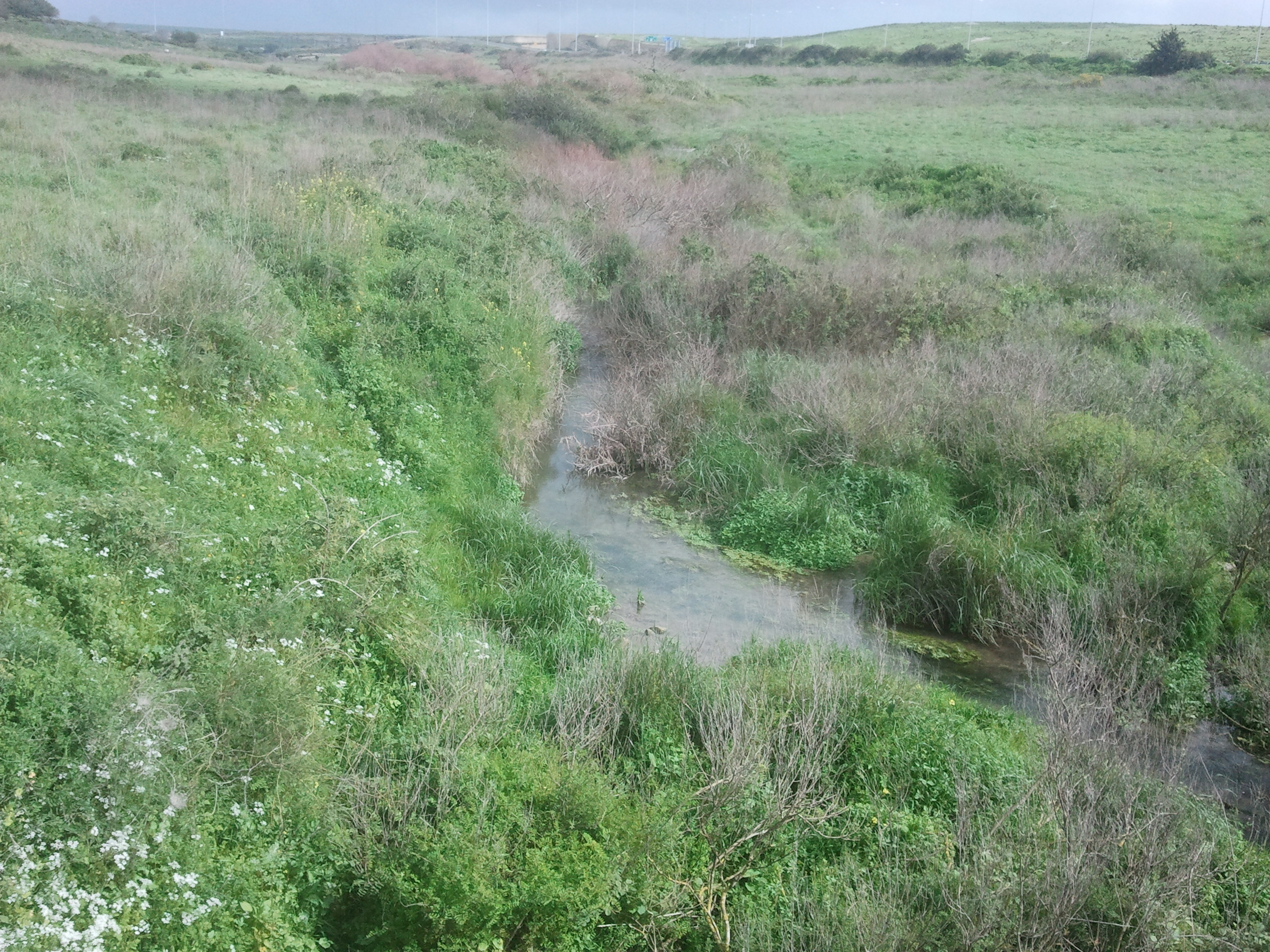 נחל תות מהווה גבול בין הר הכרמל ורמות מנשה. תחילתו ליד מחלף אליקים והוא נשפך לנחל דליה ליד בת שלמה